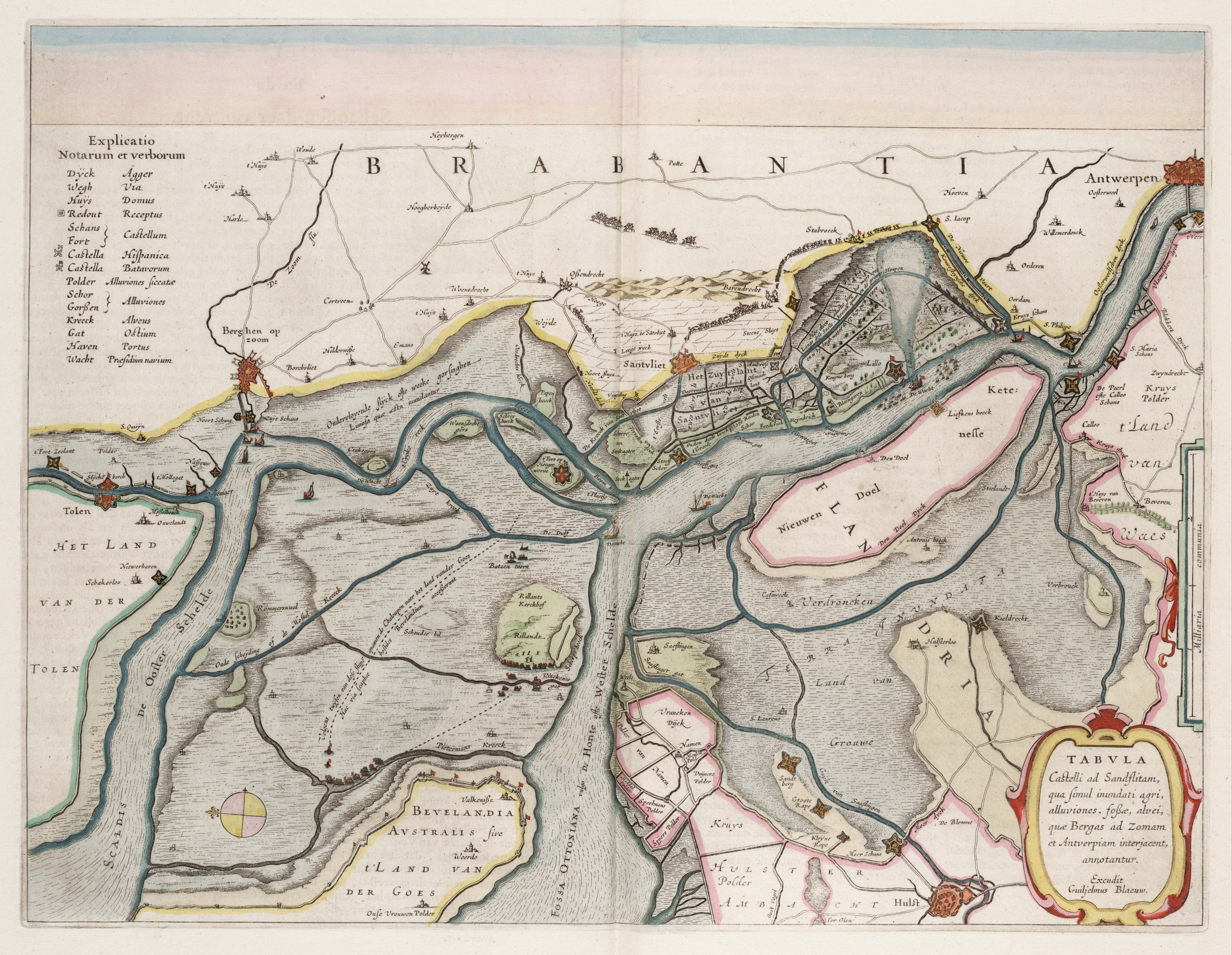 Omgeving van Reimerswaal rond 1630